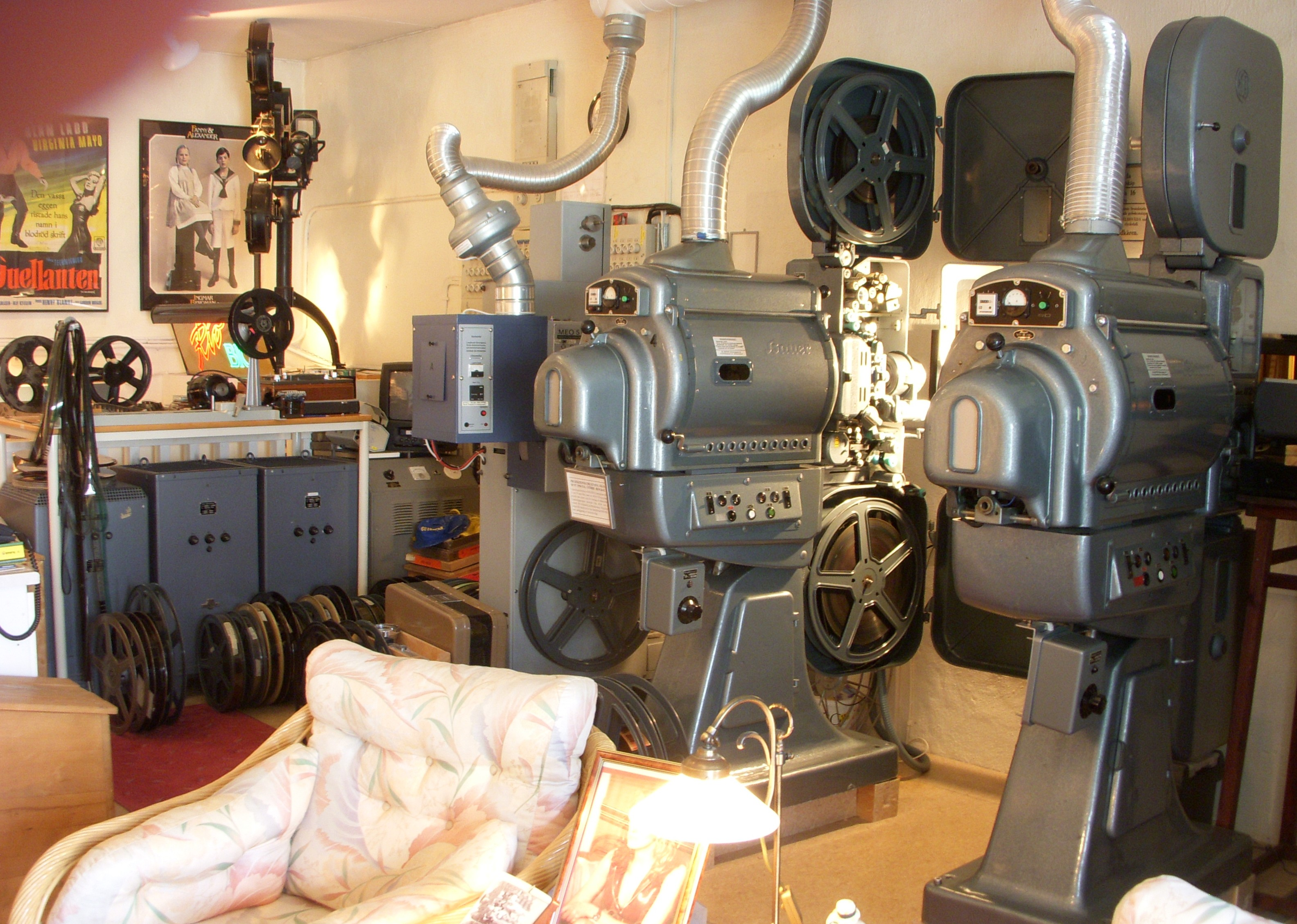 Säter biografmuseum, maskinrummet